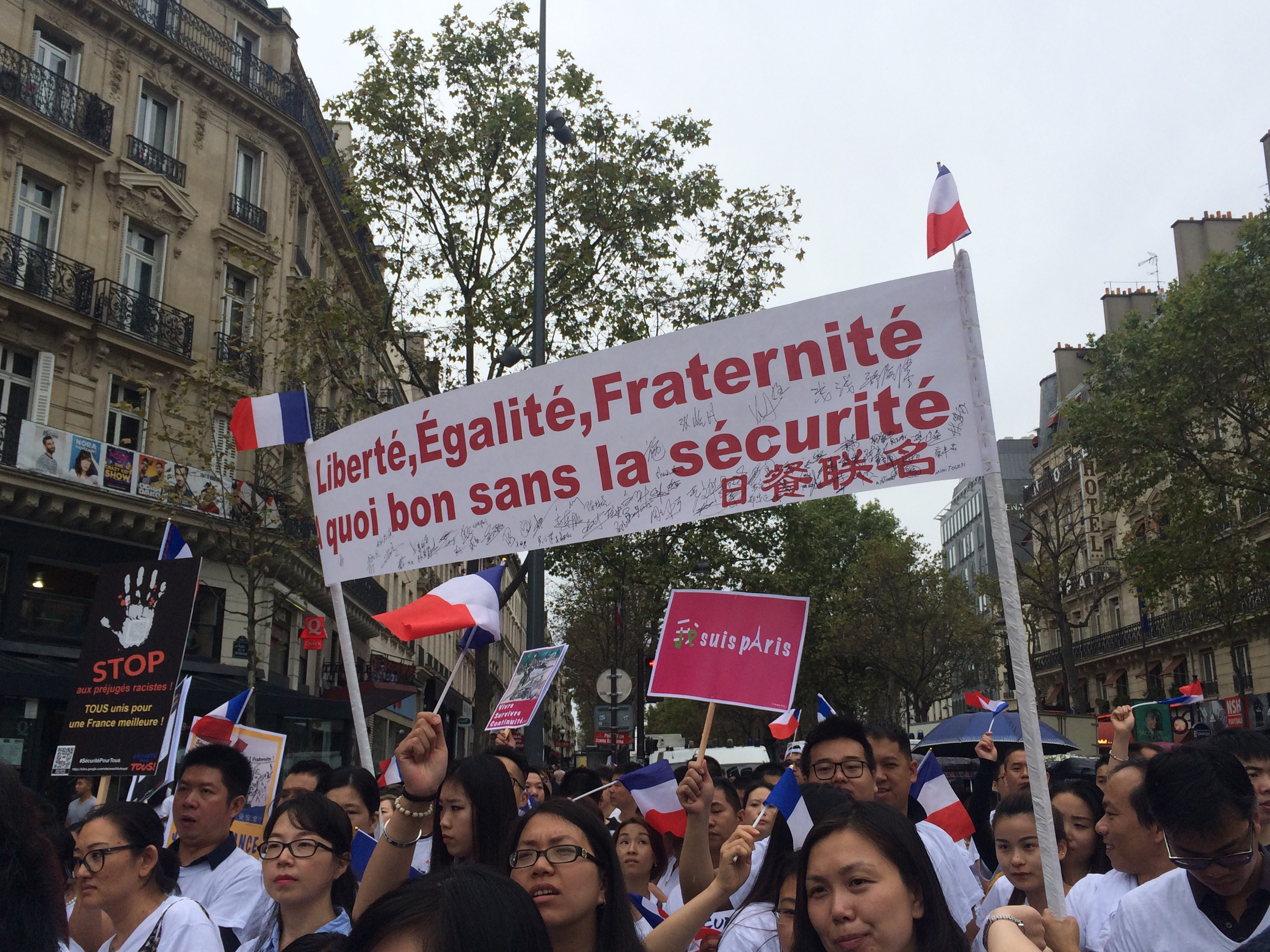 Manifestation des Chinois de France à Paris - banderole Liberté égalité fraternité sécurité